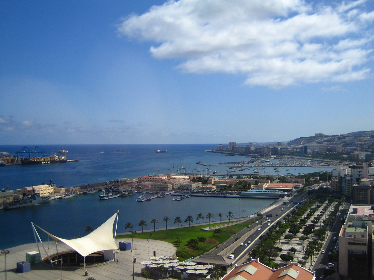 Vistas desde la planta 24 del hotel AC Los Bardinos. Restaurante AC24. En primer término el intercambiador de guaguas, parte del Puerto de La Luz y de Las Palmas, arsenal de la Armada, muelle deportivo, avenida marítima y Ciudad del Mar. Las Palmas de Gran Canaria.